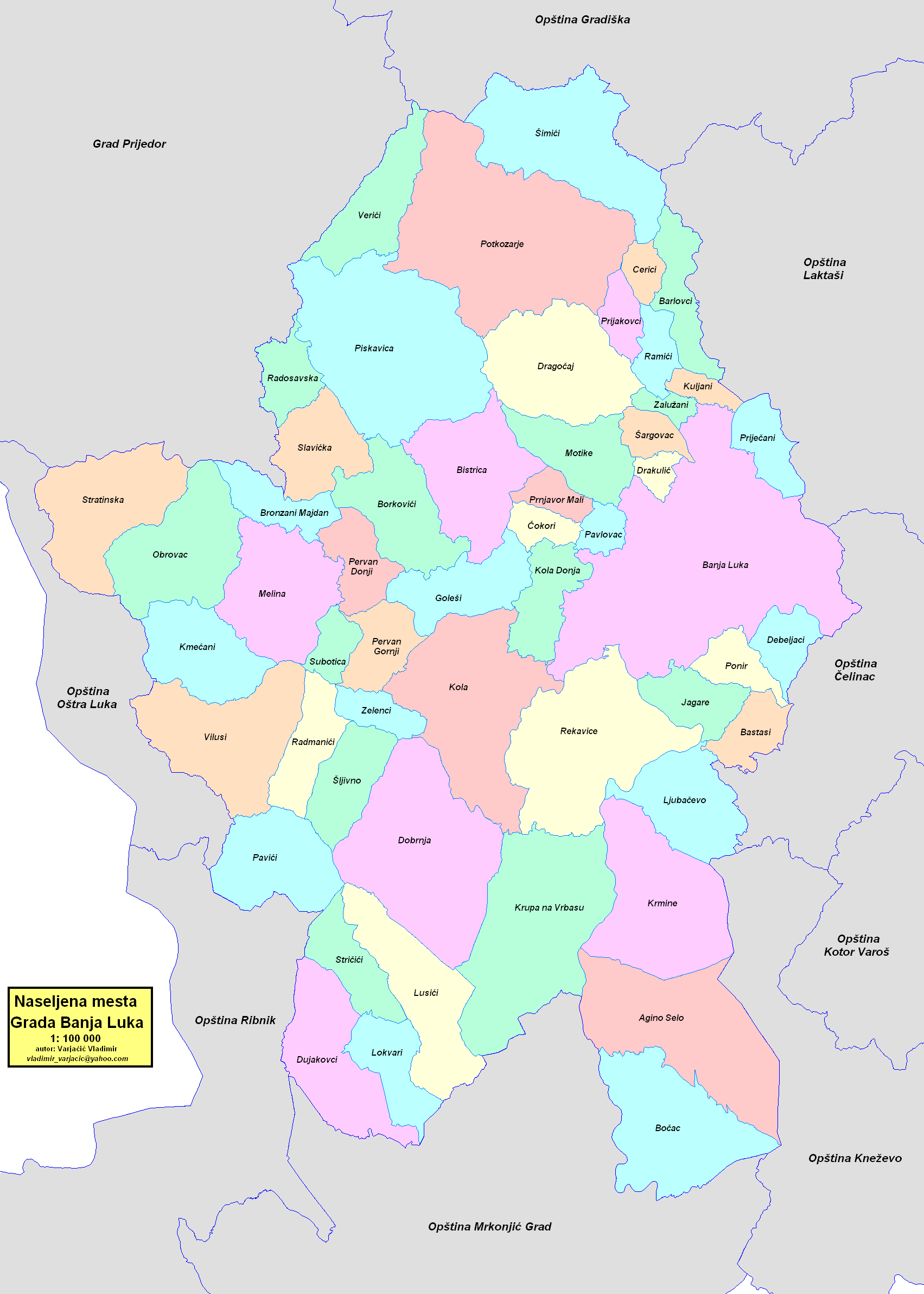 Grad Banja Luka